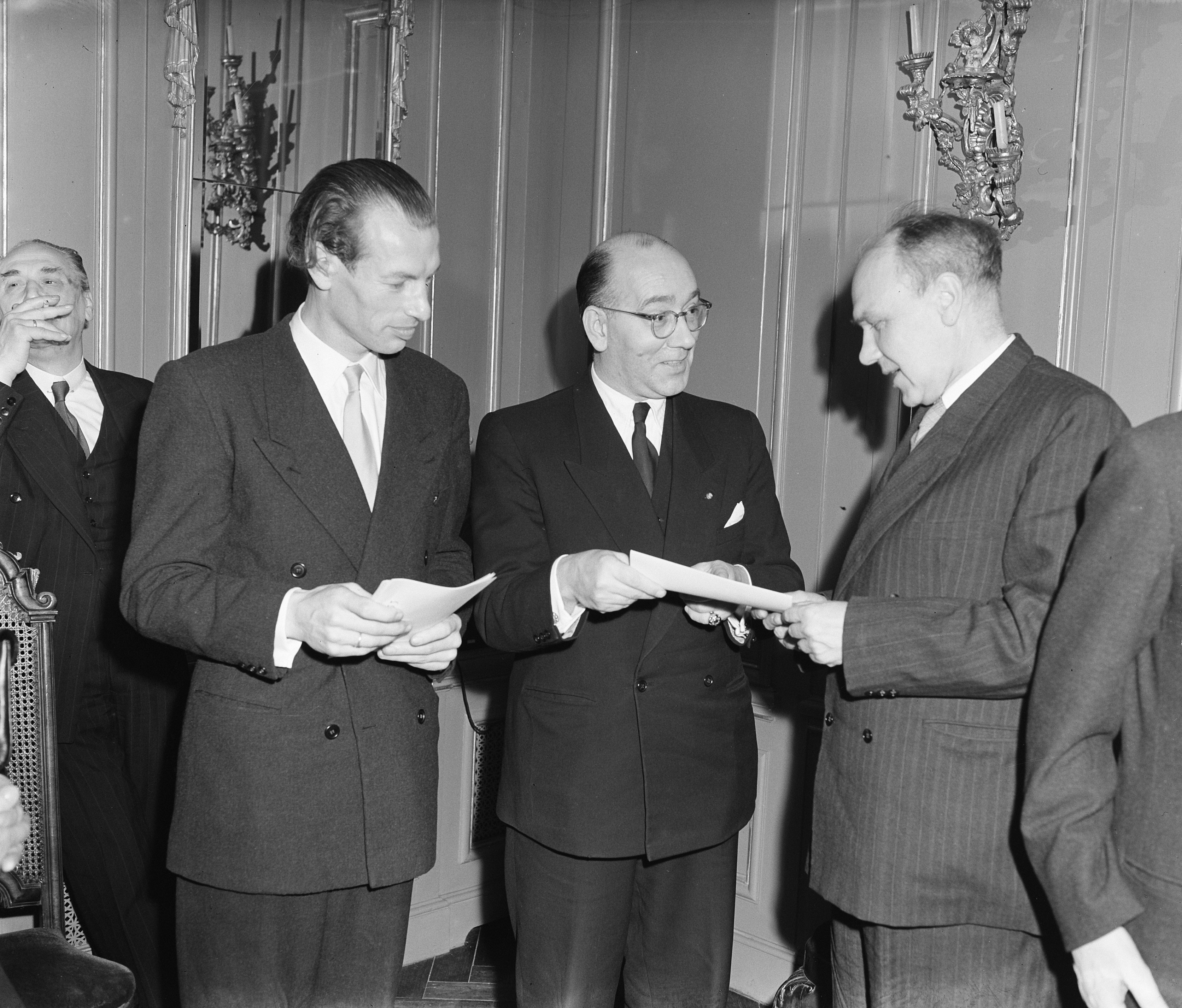 Collectie / Archief : Fotocollectie Anefo Reportage / Serie : [ onbekend ] Beschrijving : Uitreiking Prijs van de Stichting Kunstenaarsverzet 1953 te Amsterdam Annotatie : De prijswinnaars. Links graficus Ap Sok, rechts lettterkundige en stedebouwkundige Rein Blijstra Datum : 16 januari 1954 Locatie : Amsterdam, Noord-Holland Trefwoorden : prijsuitreikingen Persoonsnaam : Blijstra, Reinder, Sok, Ab Fotograaf : Rossem, Wim van / Anefo Auteursrechthebbende : Nationaal Archief Materiaalsoort : Glasnegatief Nummer archiefinventaris : bekijk toegang 2.24.01.09 Bestanddeelnummer : 906-2482